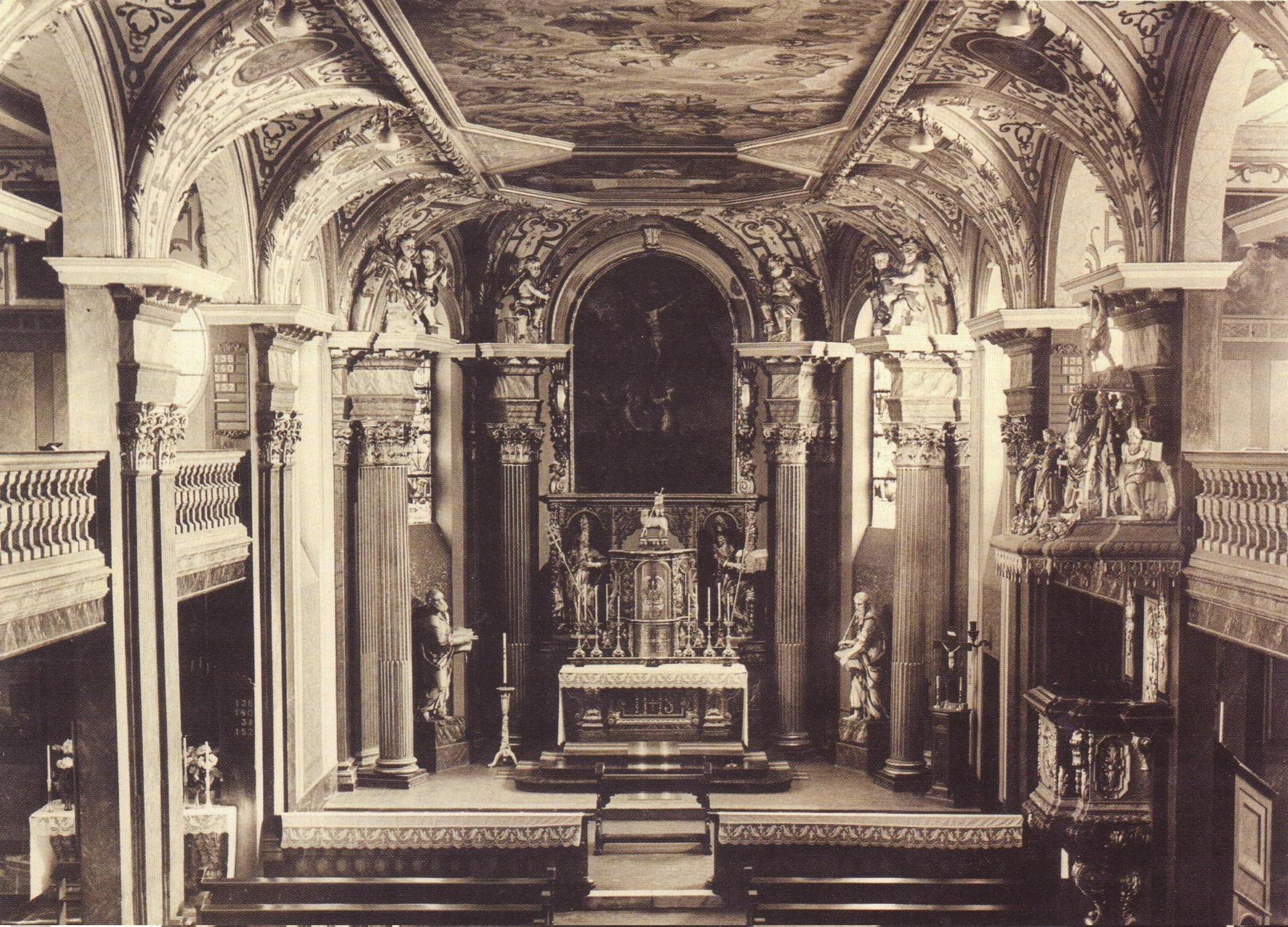 St. Nicolai, kath. Kirche in Braunschweig (1944 zerstört), Inneres